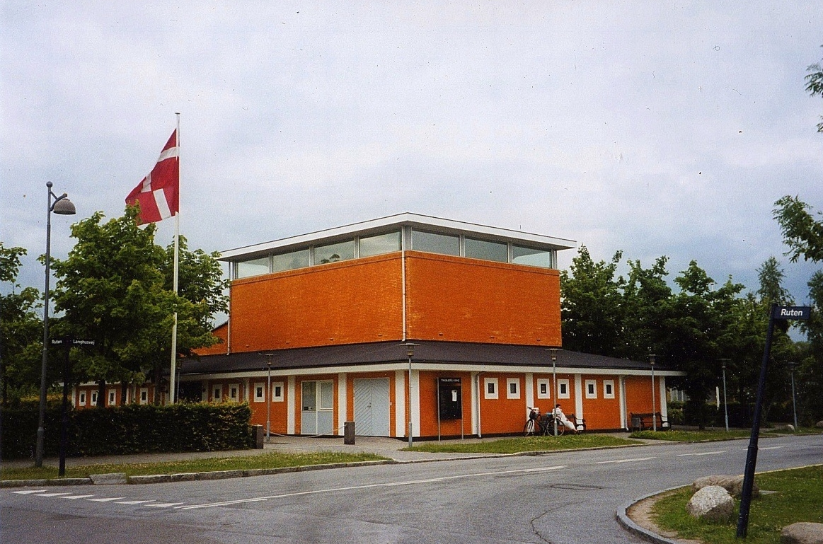 Tingbjerg Kirke, Tingbjerg Sogn, Københavns Kommune